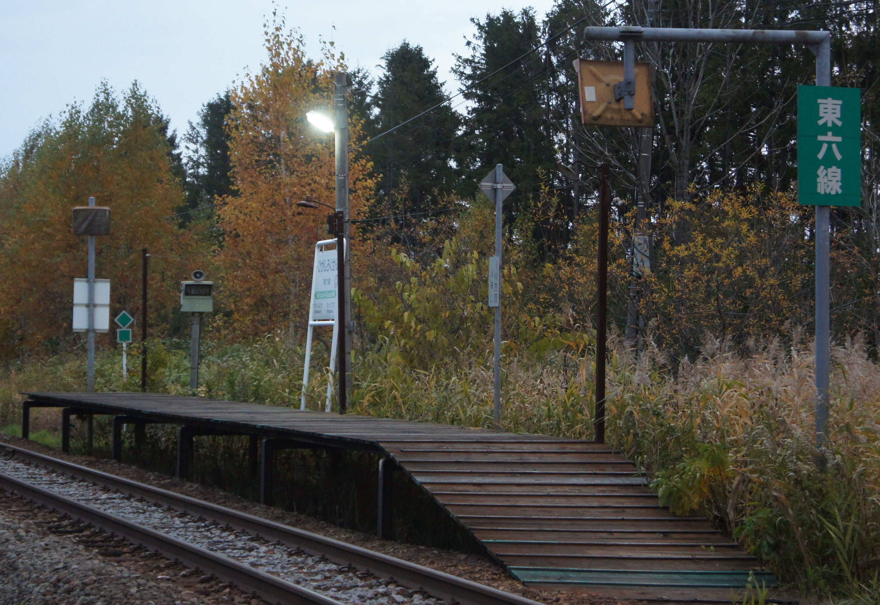 JR宗谷本線・東六線駅全景 Sony NEX-3